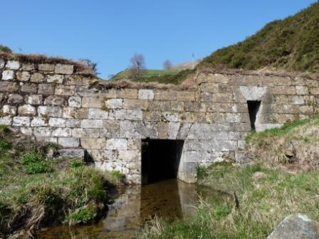 Se utilizaban para almacenar agua y ayudar a los troncos en su descenso cuando el caudal no era suficiente para flotarlos